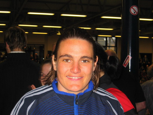 Nadine Angerer